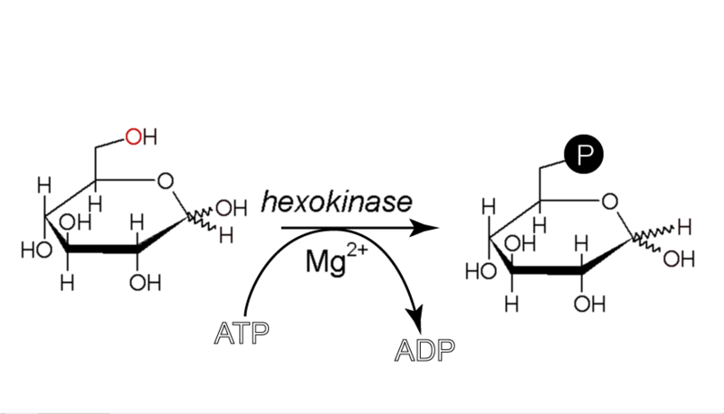 Synthèse du glucose-6-phosphat: 1ère étape de la glycolyse. Création personelle. --- Pixeltoo 25 août 2005 à 12:38 (CEST)